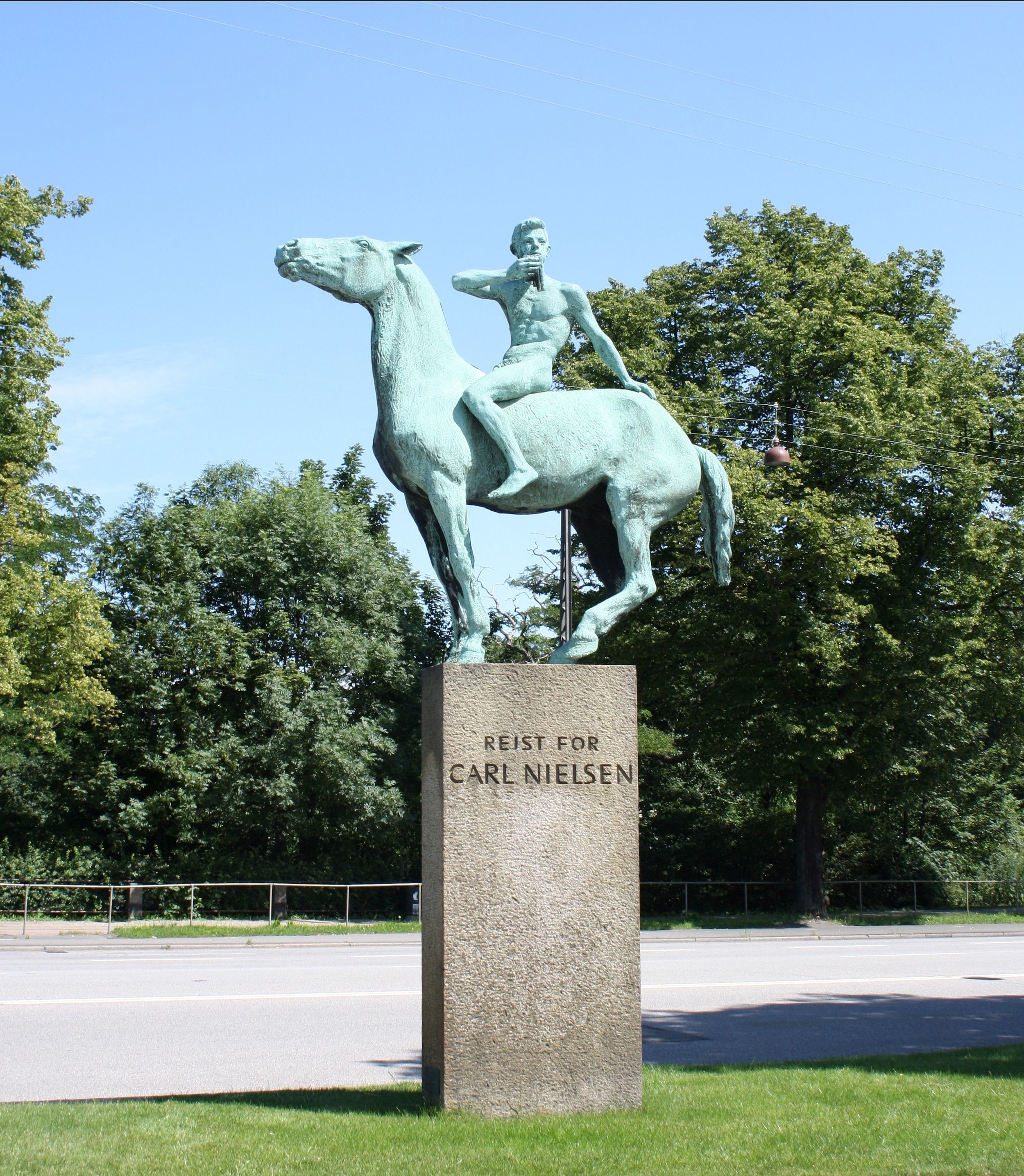 Carl Nielsen Memorial at Grønningen(Store Kongensgade in Copenahgen, Denmark